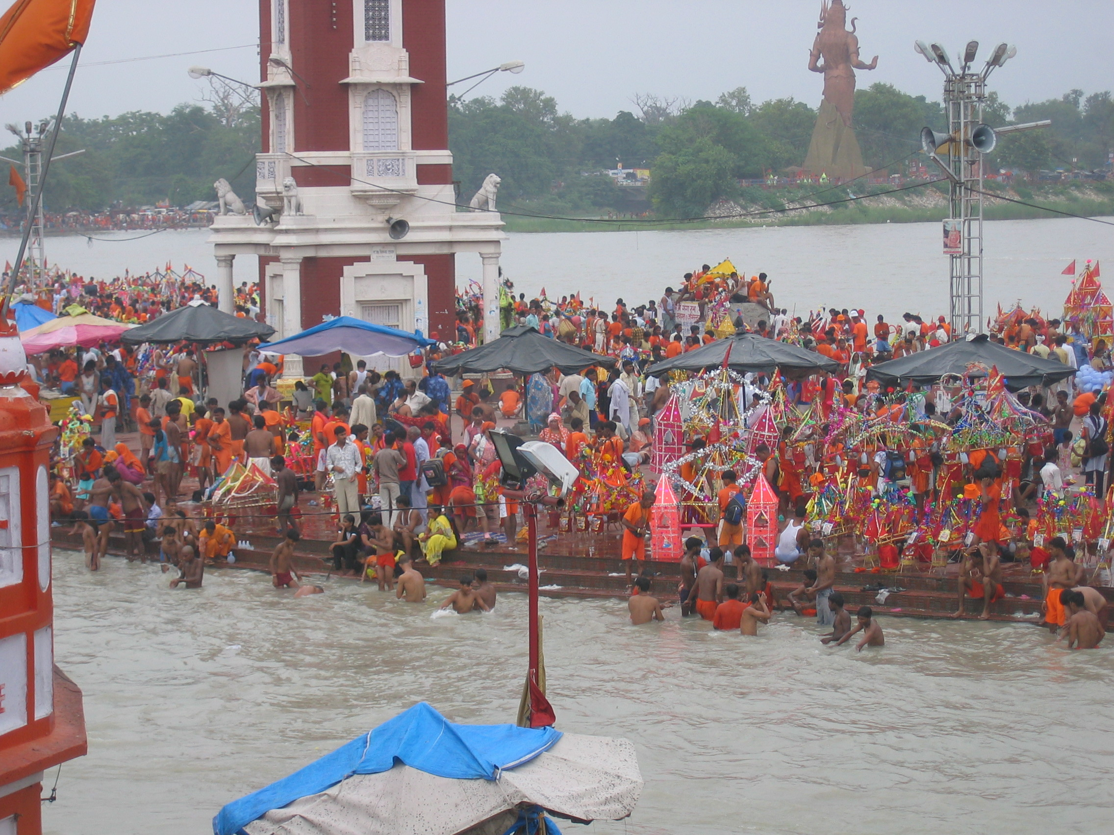 le ghat de Haridwar en milieu d'aprés-midi